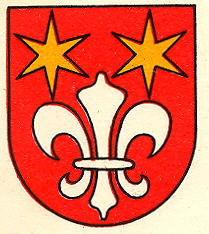 Wappen von Albaredo per San Marco